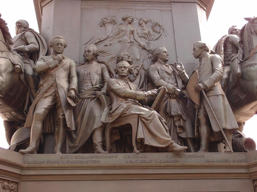 Relief des preußischen Justizreformers Johann Heinrich Casimir Graf von Carmer (1720–1801) am Sockel des Denkmals für Friedrich den Großen, Berlin, Unter den Linden